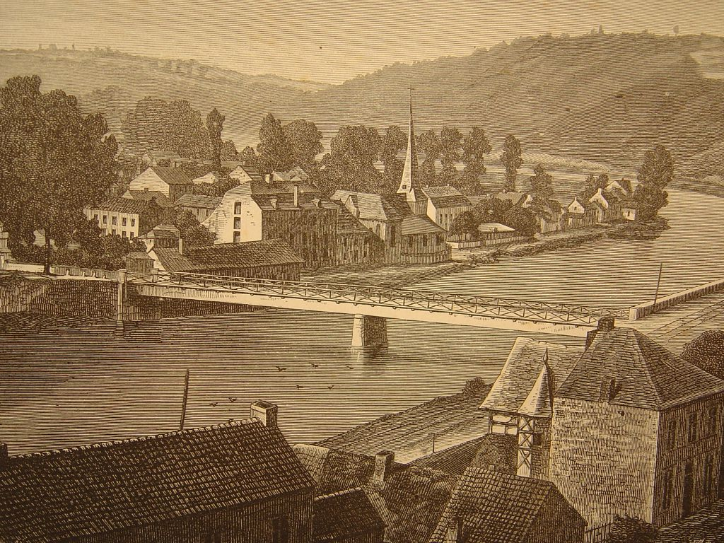 Le pont de Tilff, près de Liège